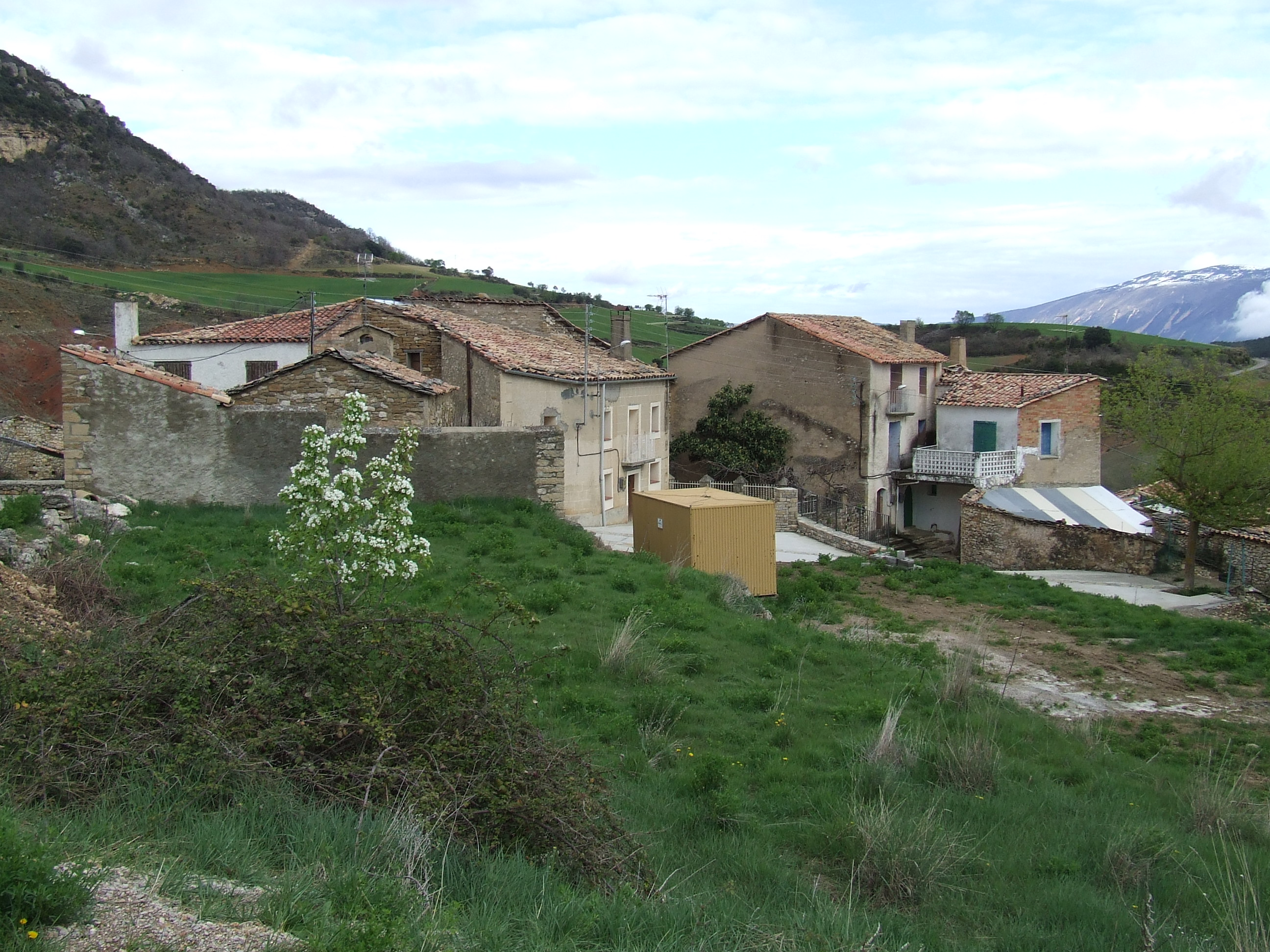 Vista general del poble de Beniure (Sant Esteve de la Sarga, Pallars Jussà)